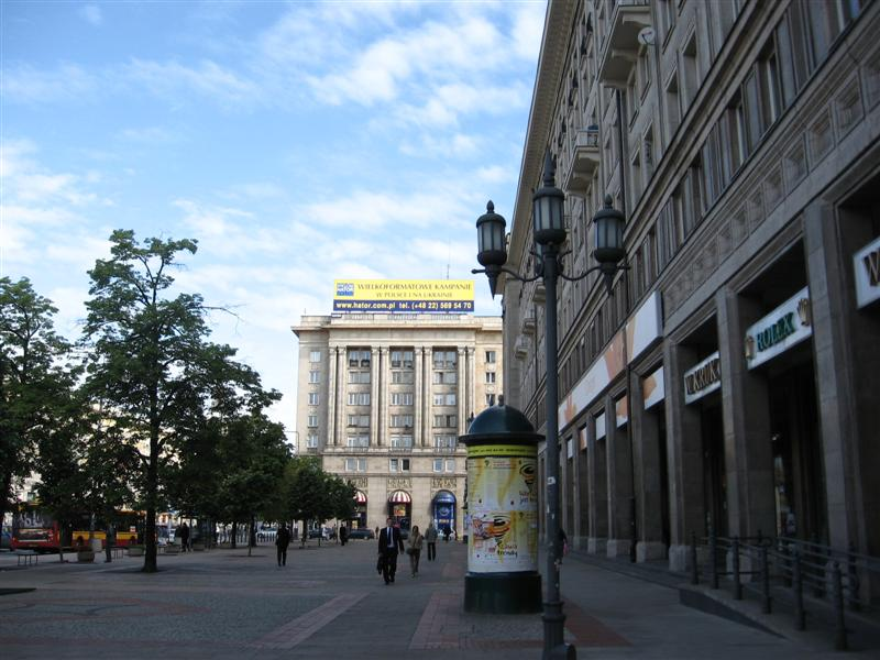 Plac Konstytucji, z prawej strony Salon Jubilerski W.KRUK i Orange